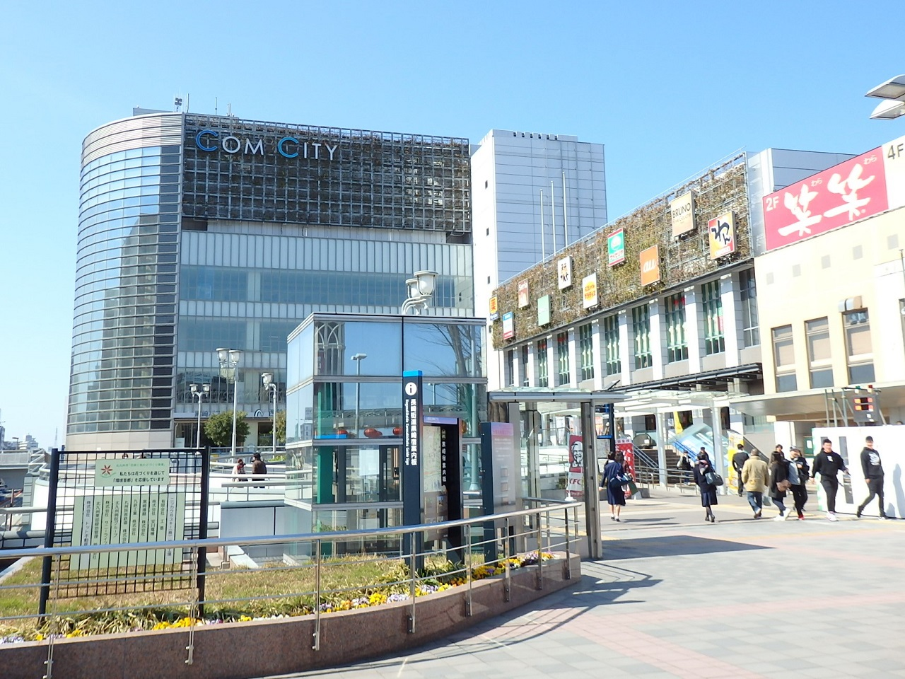 2017年2月、COMCITYを撮影。